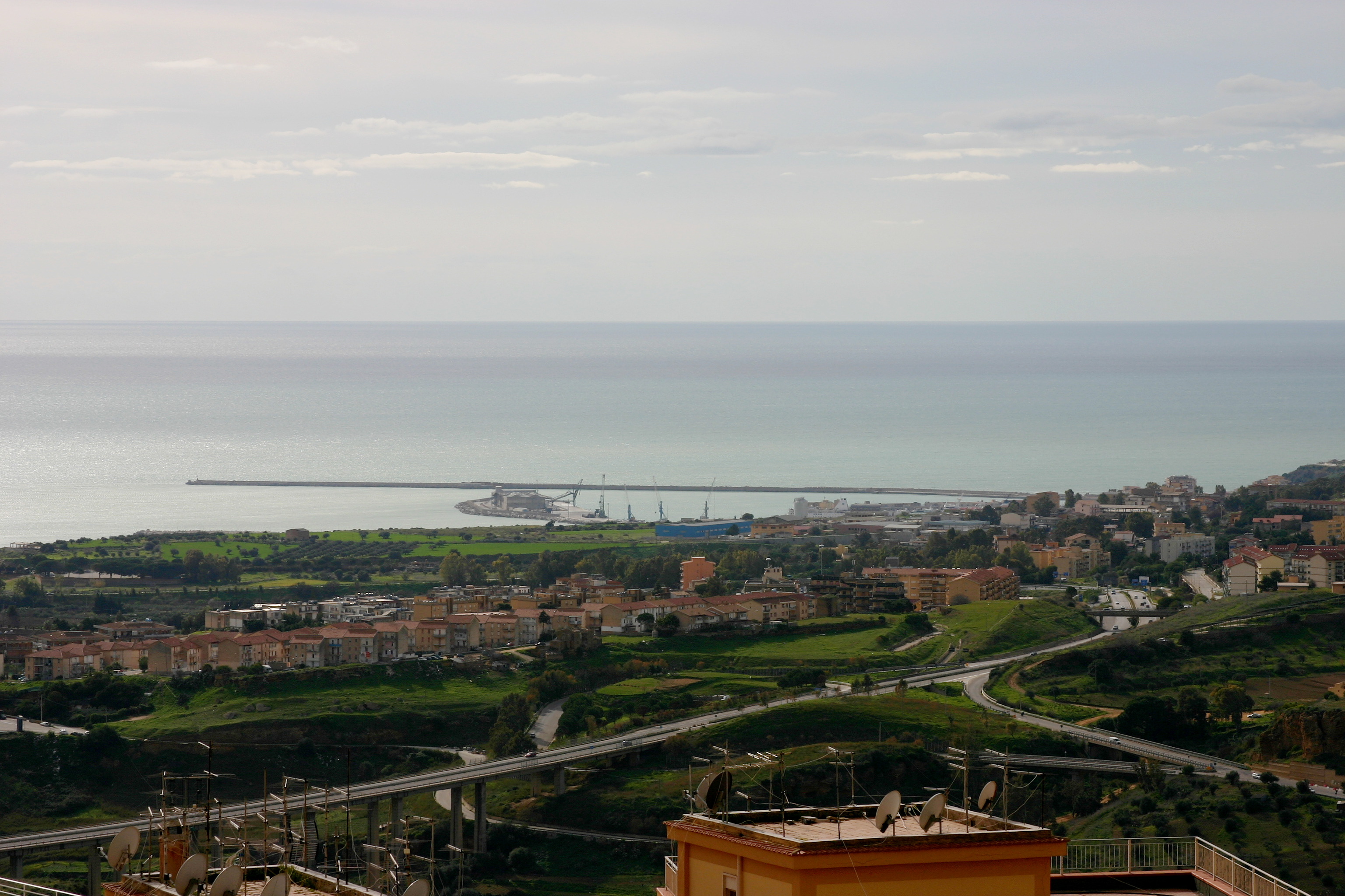 Views of Agrigento